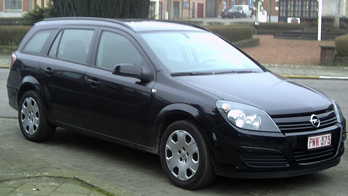 Opel Astra, 2004-2006